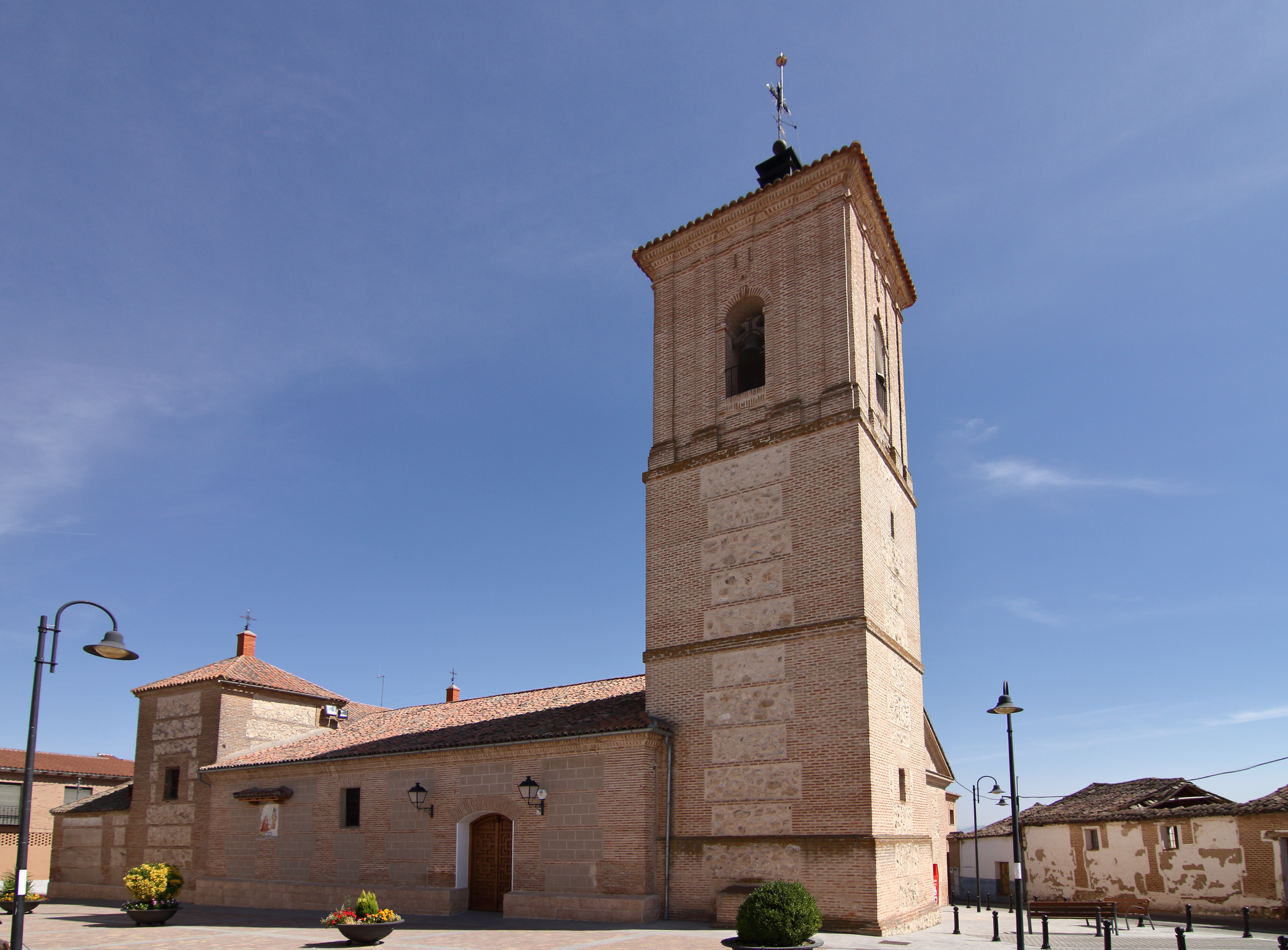 Gerindote, Iglesia de San Mateo Apóstol, fachada norte